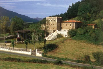 Avellaneda